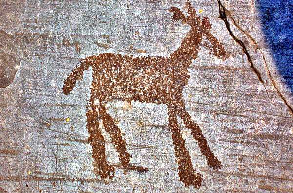 Rock Drawing in "Parco nazionale delle incisioni rupestri di Naquane" Capo di Ponte (Italy). Picture taken by user:Idéfix, may 2005